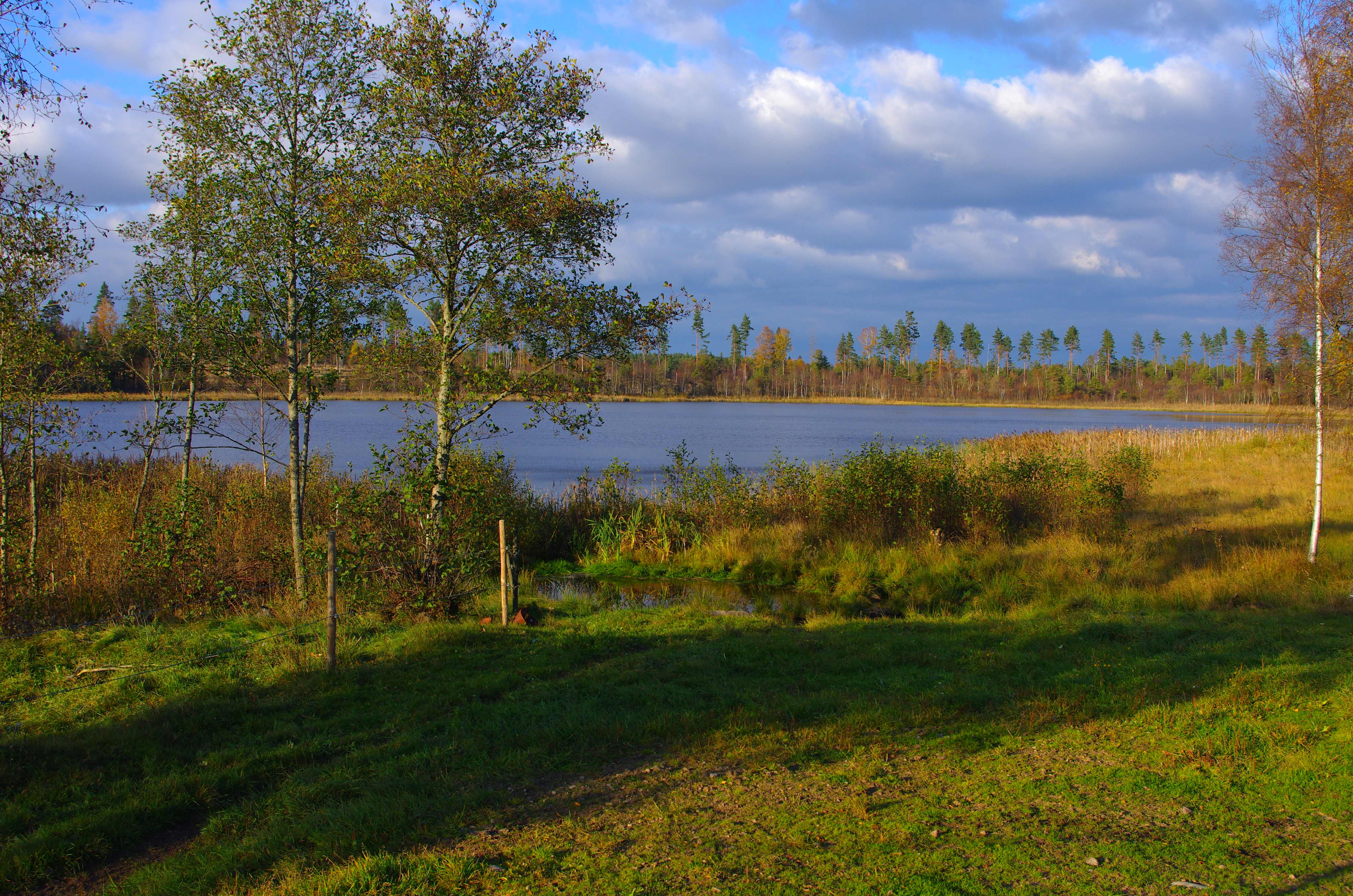 Stora Eketången är en sjö i östra utkanten av Vara kommun i Västergötland i Sverige. Omkring 500 m väster ut rinner Lidan.